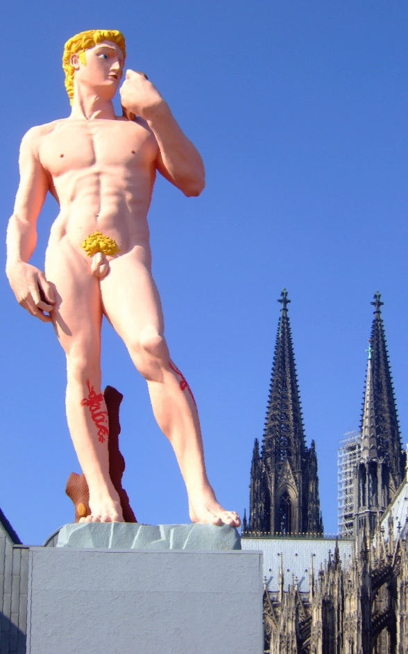 Hans-Peter Feldmann: „David“ (2006) - Standort: Köln - Heinrich-Böll-Platz